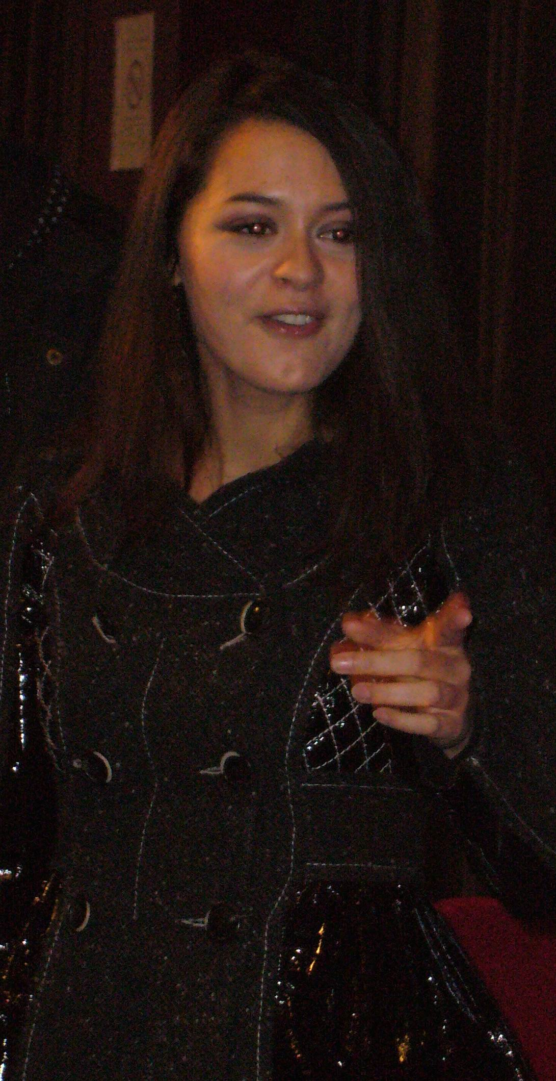 Émilie Simon au festival Fantastic'Arts